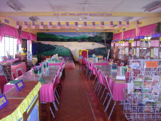 Perpustakaan SK Sena